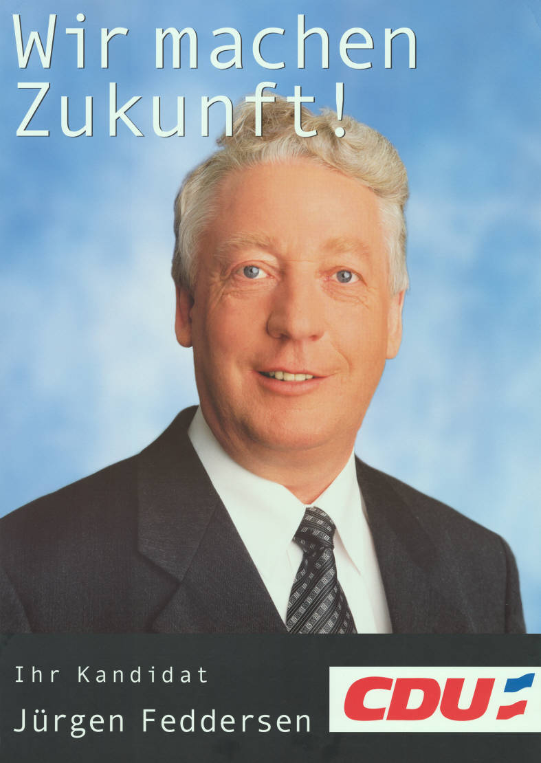 Wir machen Zukunft! Ihr Kandidat Jürgen Feddersen CDUAbbildung:PorträtfotoPlakatart:Kandidaten-/Personenplakat mit PorträtObjekt-Signatur:10-012 : 1206Bestand:Landtagswahlplakate Schleswig-Holstein (10-012)GliederungBestand10-18:Landtagswahlplakate Schleswig-Holstein (10-012) » CDULizenz:KAS/ACDP 10-012 : 1206 CC-BY-SA 3.0 DE